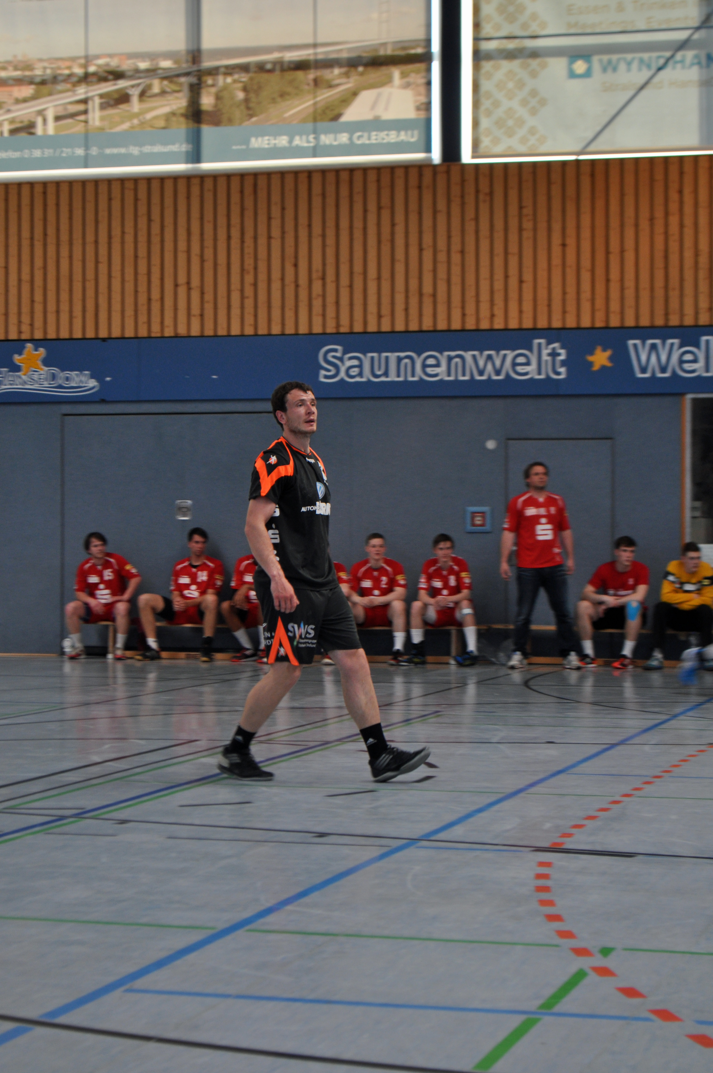 Beim Spiel der ersten Männer-Mannschaft des Stralsunder HV nach dem Punktspiel am 26.4.2014 gegen den Lausitzer HC in der Vogelsanghalle Stralsund. Durch den 37:28-Sieg wurde das Team Meister der Oberliga Ostsee-Spree und steht als Aufsteiger in die 3. Liga (DHB) fest. Im Bild Aleksander Kokoszka.